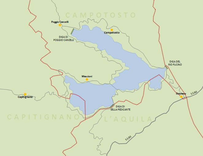 Mappa del lago di Campotosto